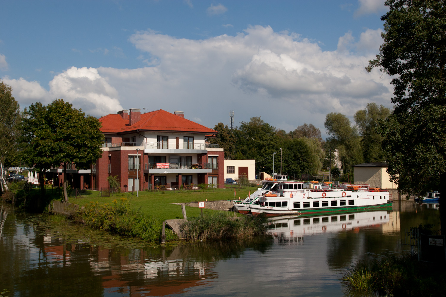 Baza żeglugi Ostródzko-Elbląskiej